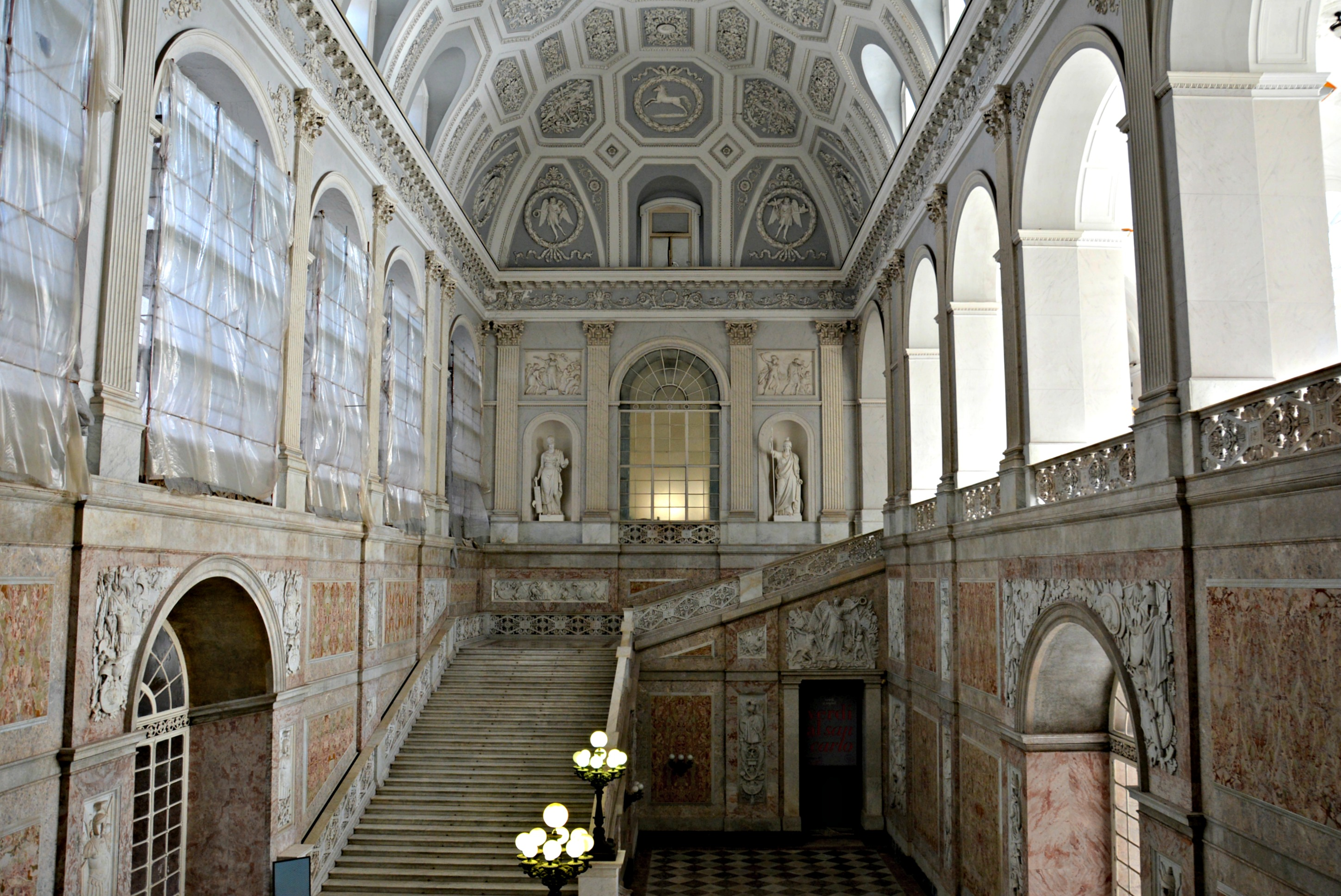 Vedi titolo